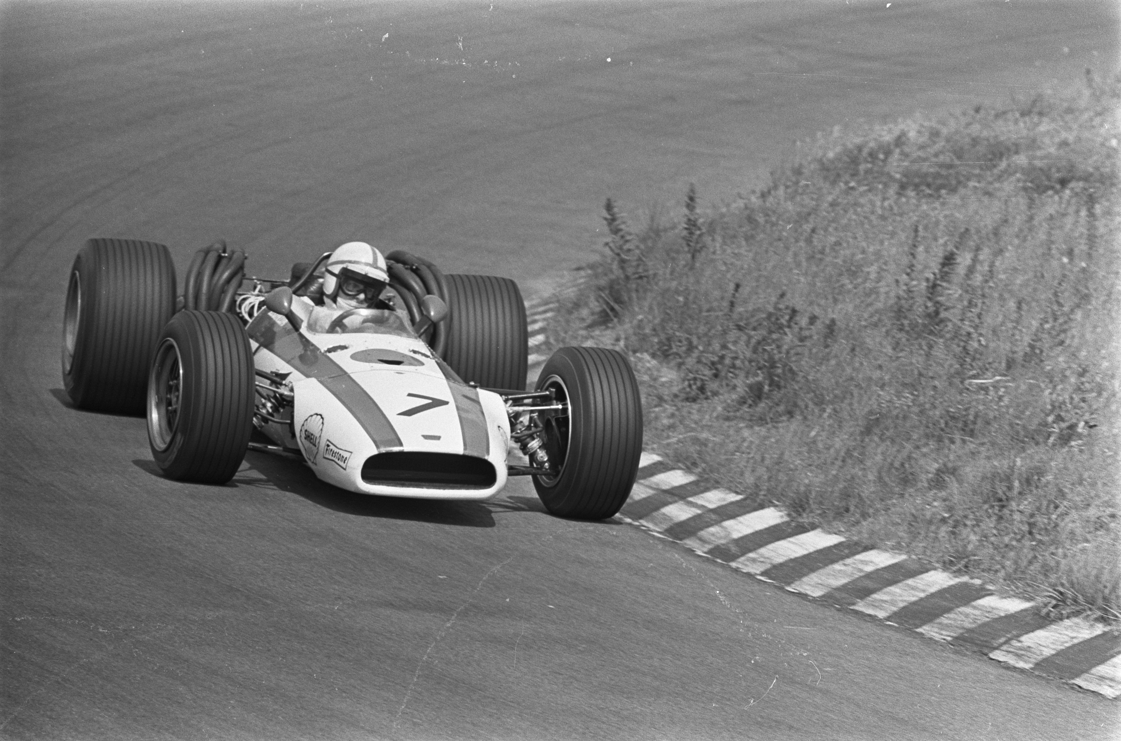 Grand Prix 68 Zandvoort training. Nummers 6.9 Bruce Mc Laren , nummer 7 John Surters , nummer 8 Graham Hill.